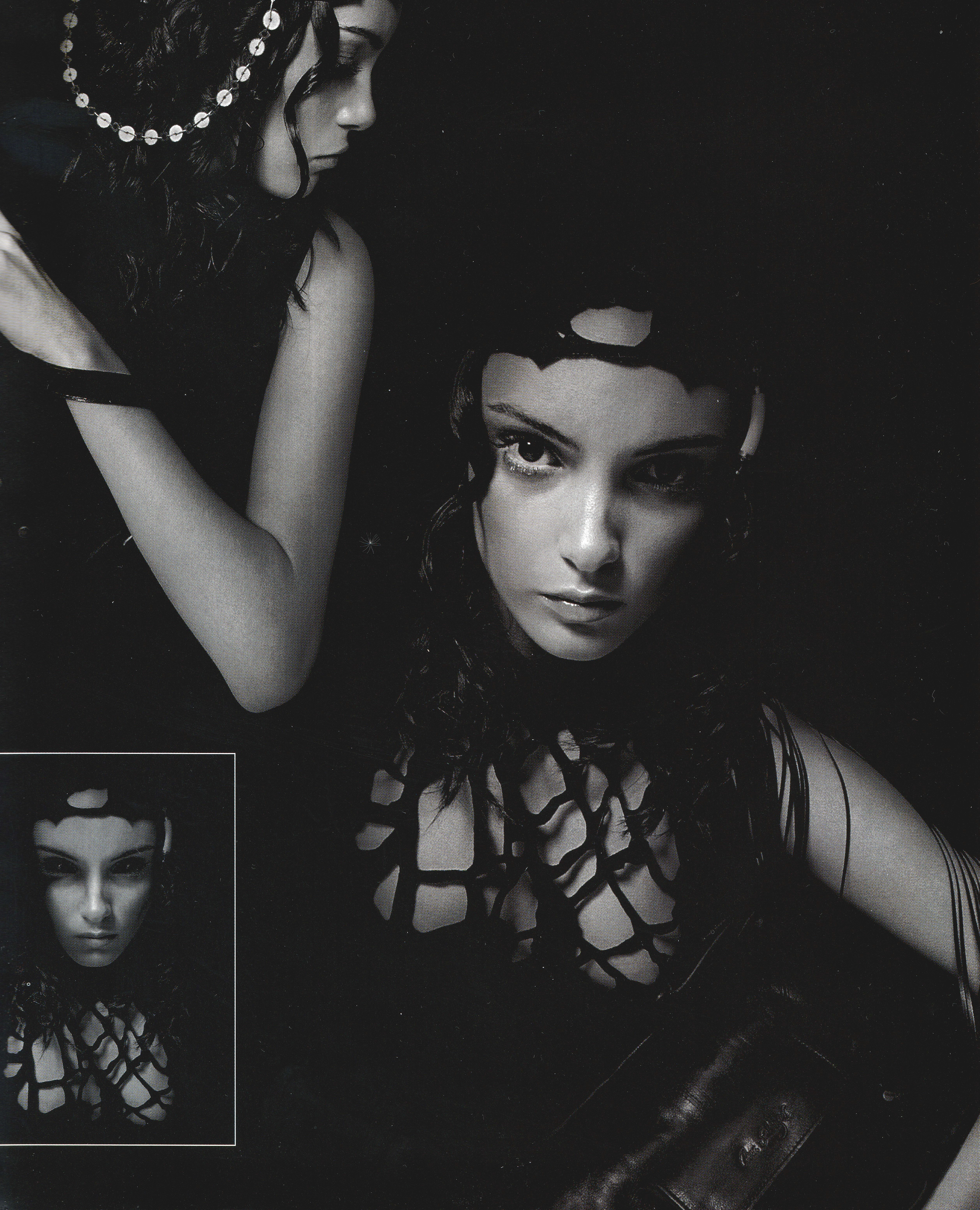 Foto de catálogo Ana Salazar 2002